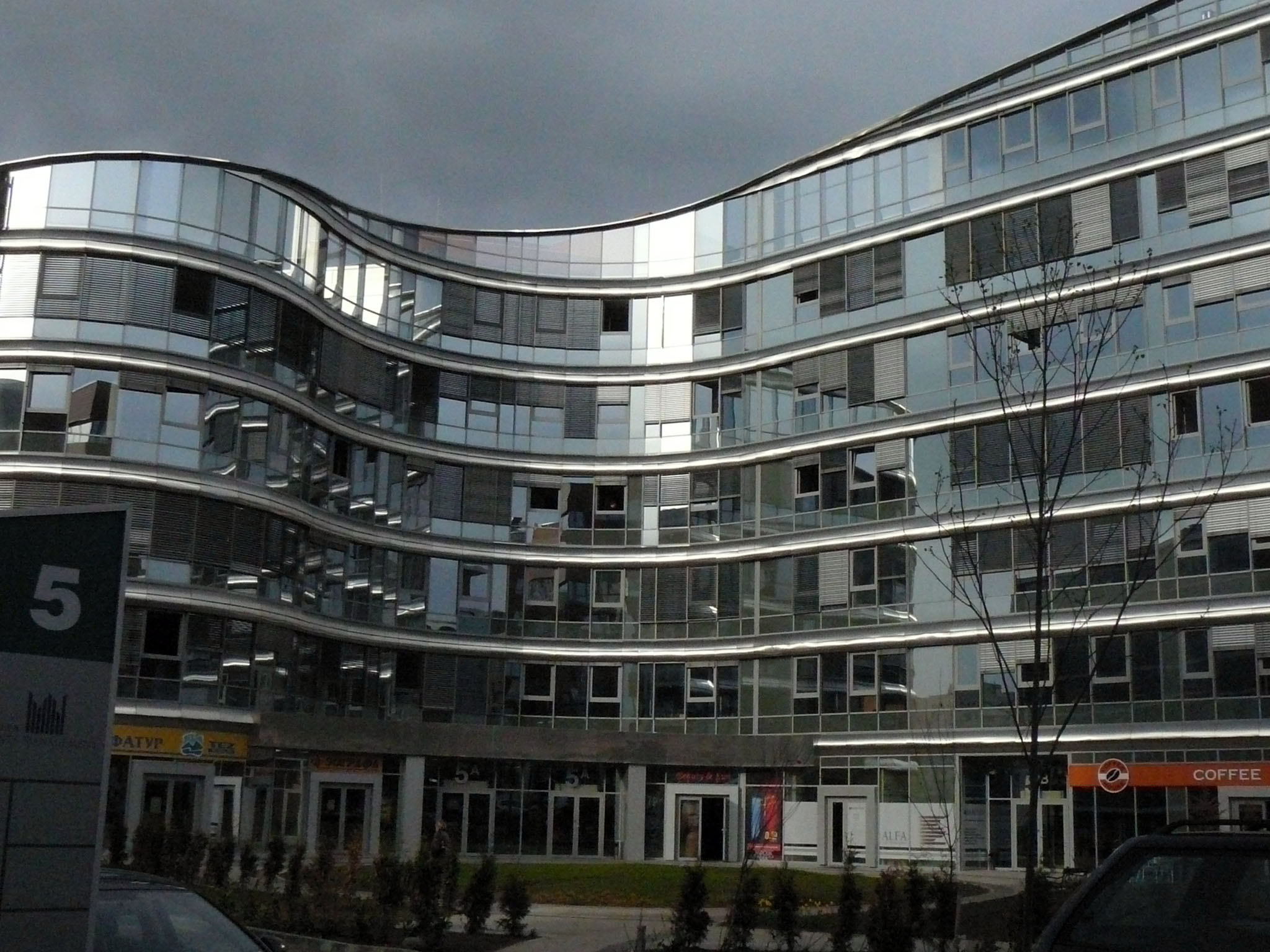 Business Park Sofia, Bulgaria